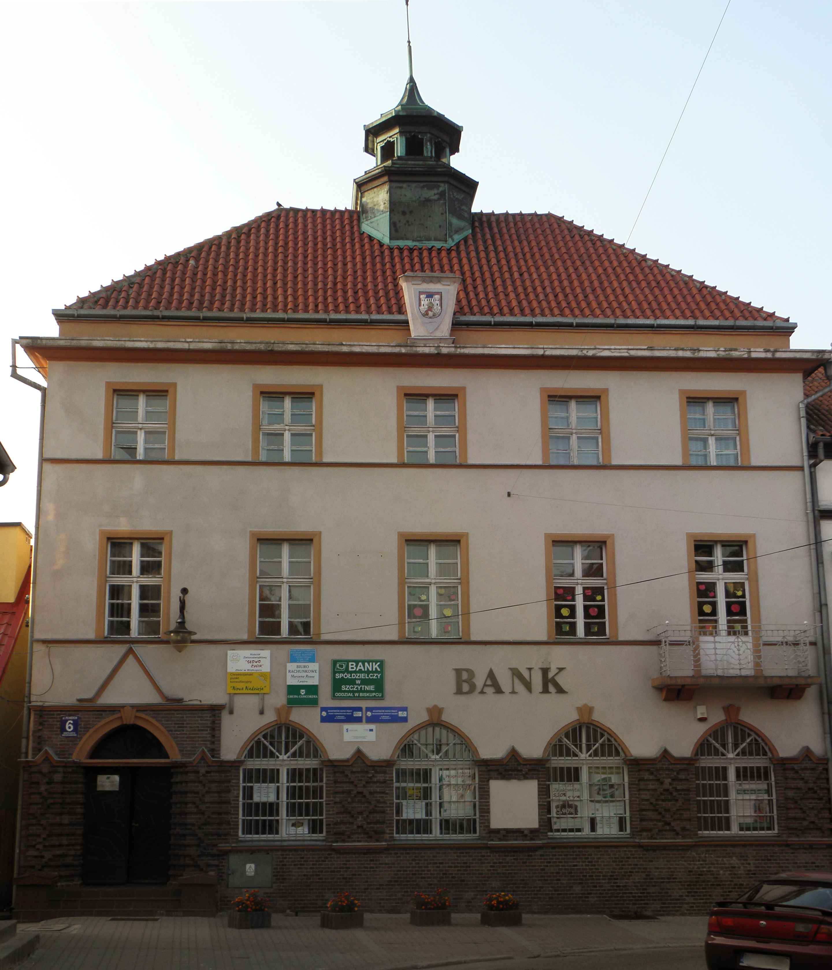 Biskupiec, ul. Pionierów 6 - ratusz (zabytek nr A-2258 z 8.09.1987)